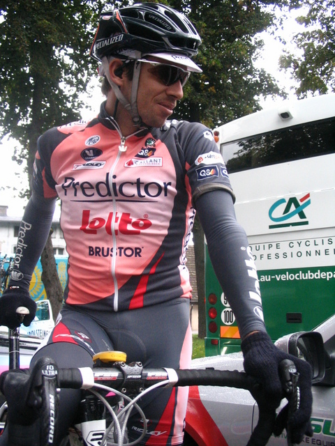 Czwarty etap 64. Tour de Pologne: Chojnice - Poznań